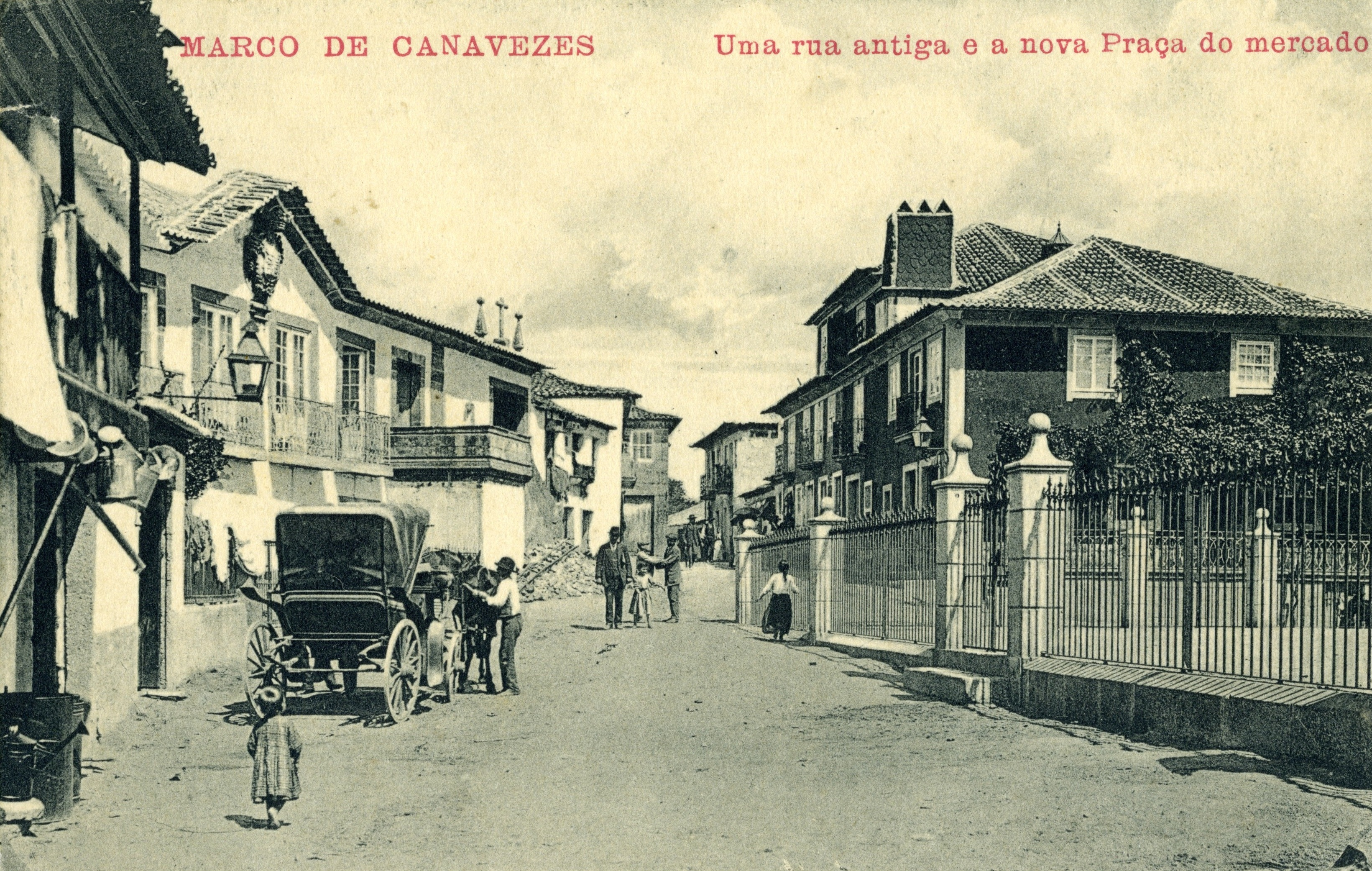 Vue d'une rue de Marco de Canavezes, portugal, avec la place du marché. 1904